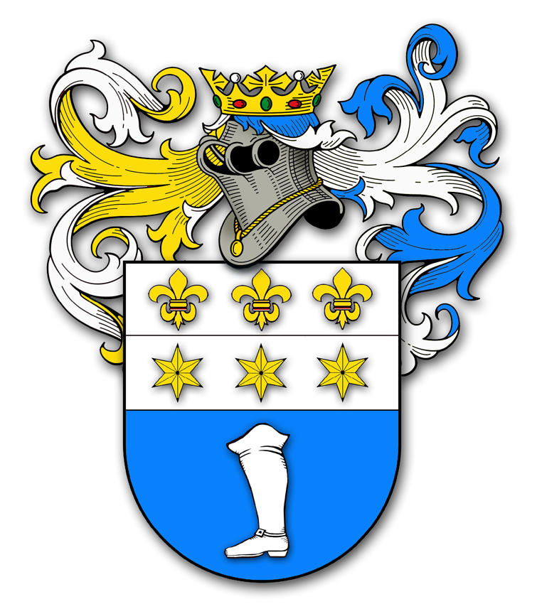 Brasão Calegari de Bergamo.